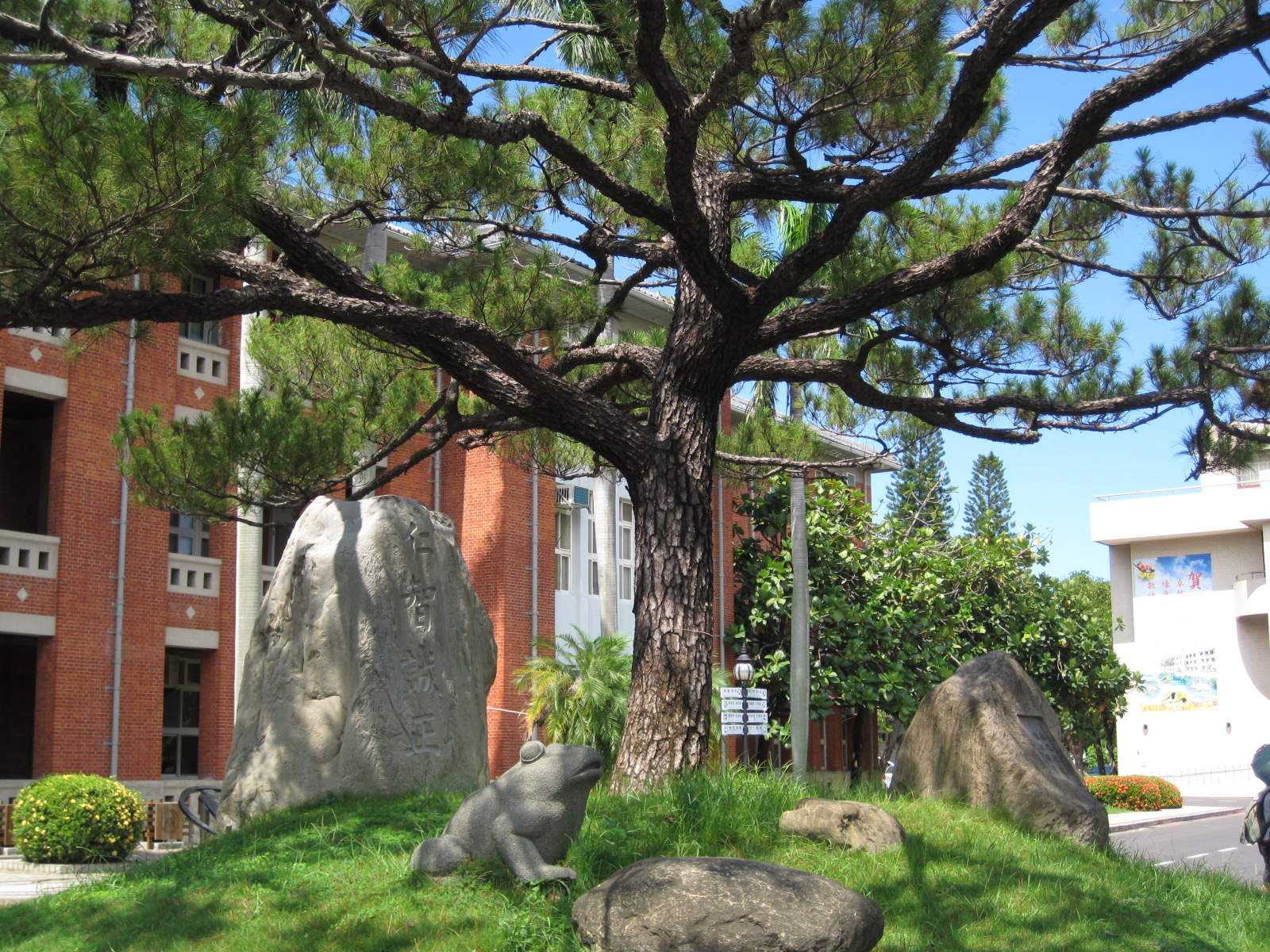 國立臺南大學老松與仁智誠正石碑